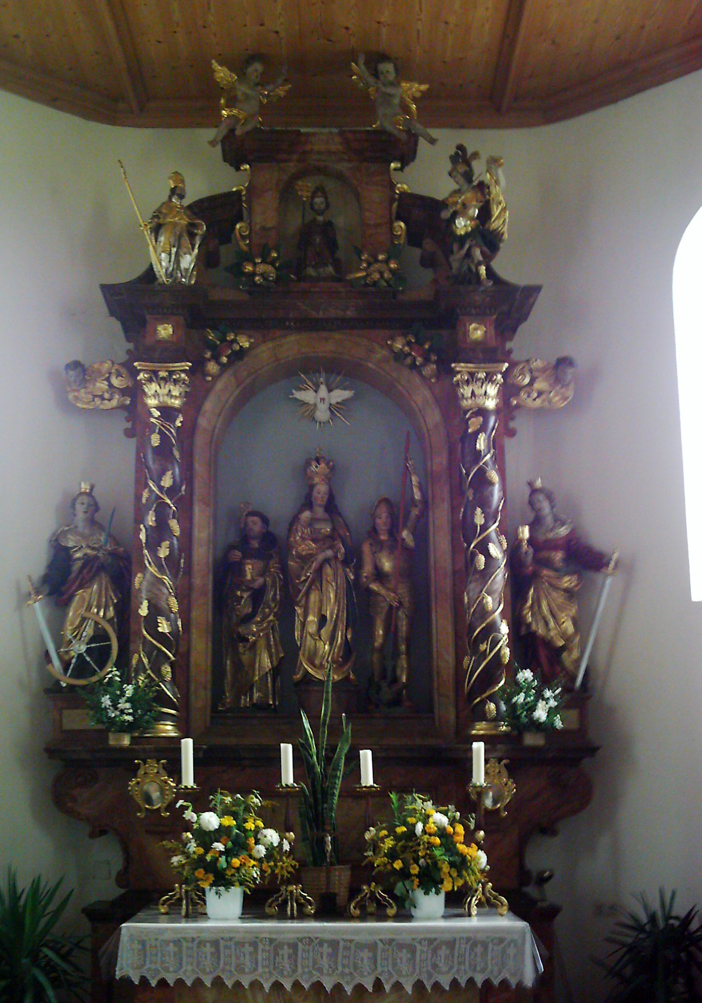 Kapelle St. Urban (Egelsee) von 1482, oberste Figur der Heilige Urban.